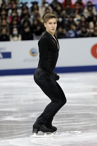 Эндрю Торгашев (США) на финале юниорского Гран-при 2017-2018 Эндрю Торгашев